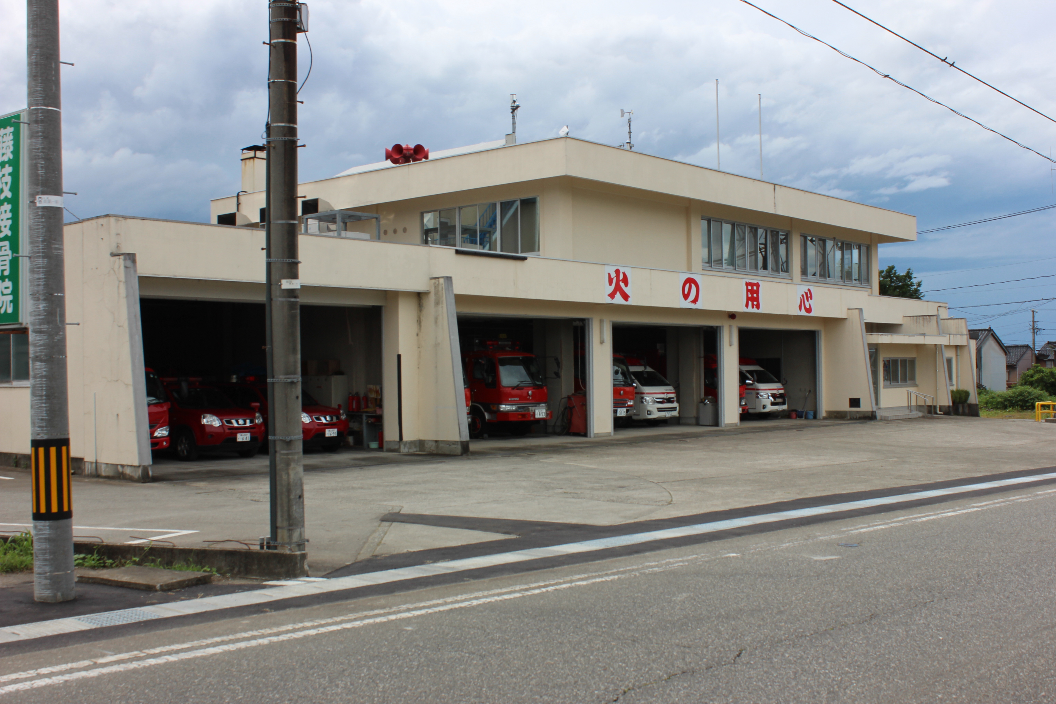 立山町消防本部・消防署